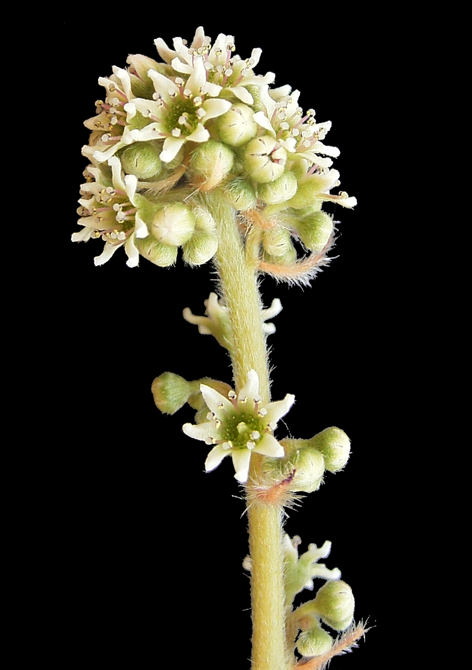 Zwerg-Krug Blüte source own work date 18.7.2008 author Denis Barthel